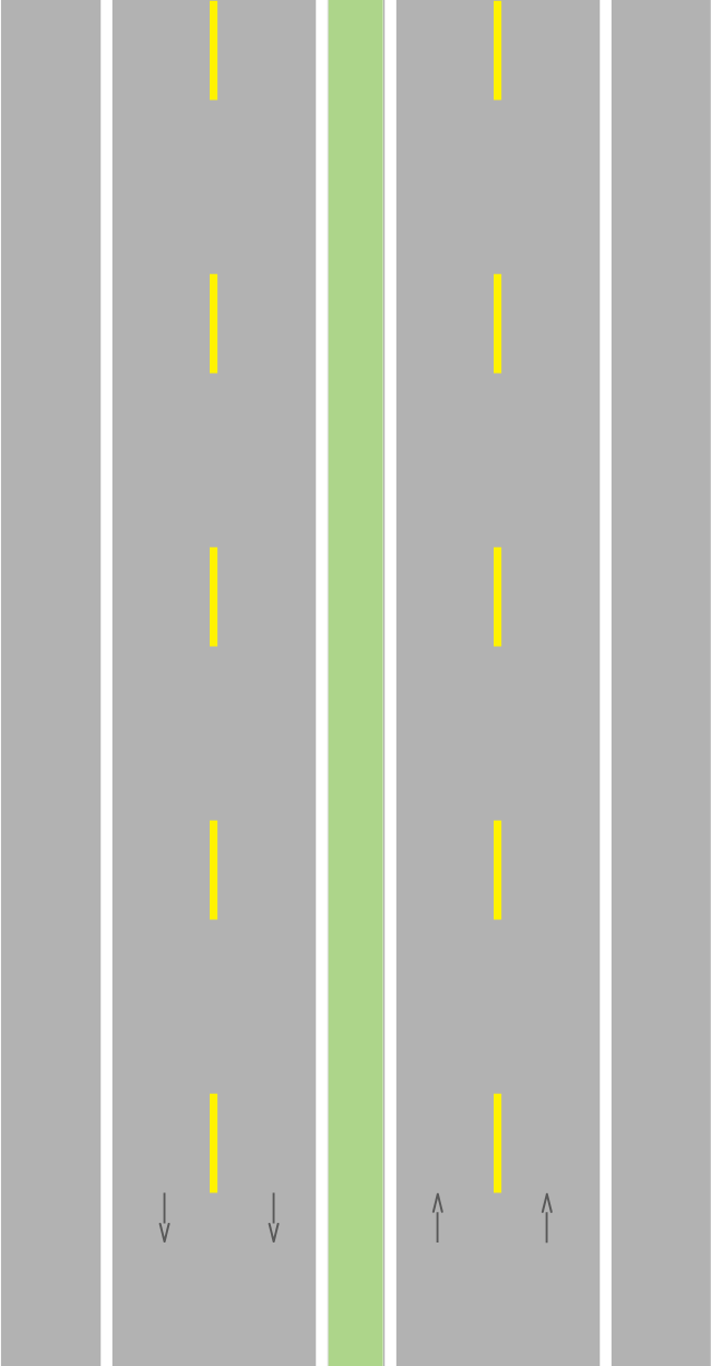 In Austria, fino al 1995, le strisce gialle venivano utilizzate come segnaletica orizzontale principale, compreso anche frecce direzionali; Mentre l'utilizzo delle strisce bianche veniva utilizzato sulle strisce pedonali, sulle fermate autobus e lungo il margine della strada su entrambi i lati. Questa immagine è come veniva utilizzato nelle autostrade austriache fino al 1995, quando che le strisce gialle vengono sostituite con quelle bianche.